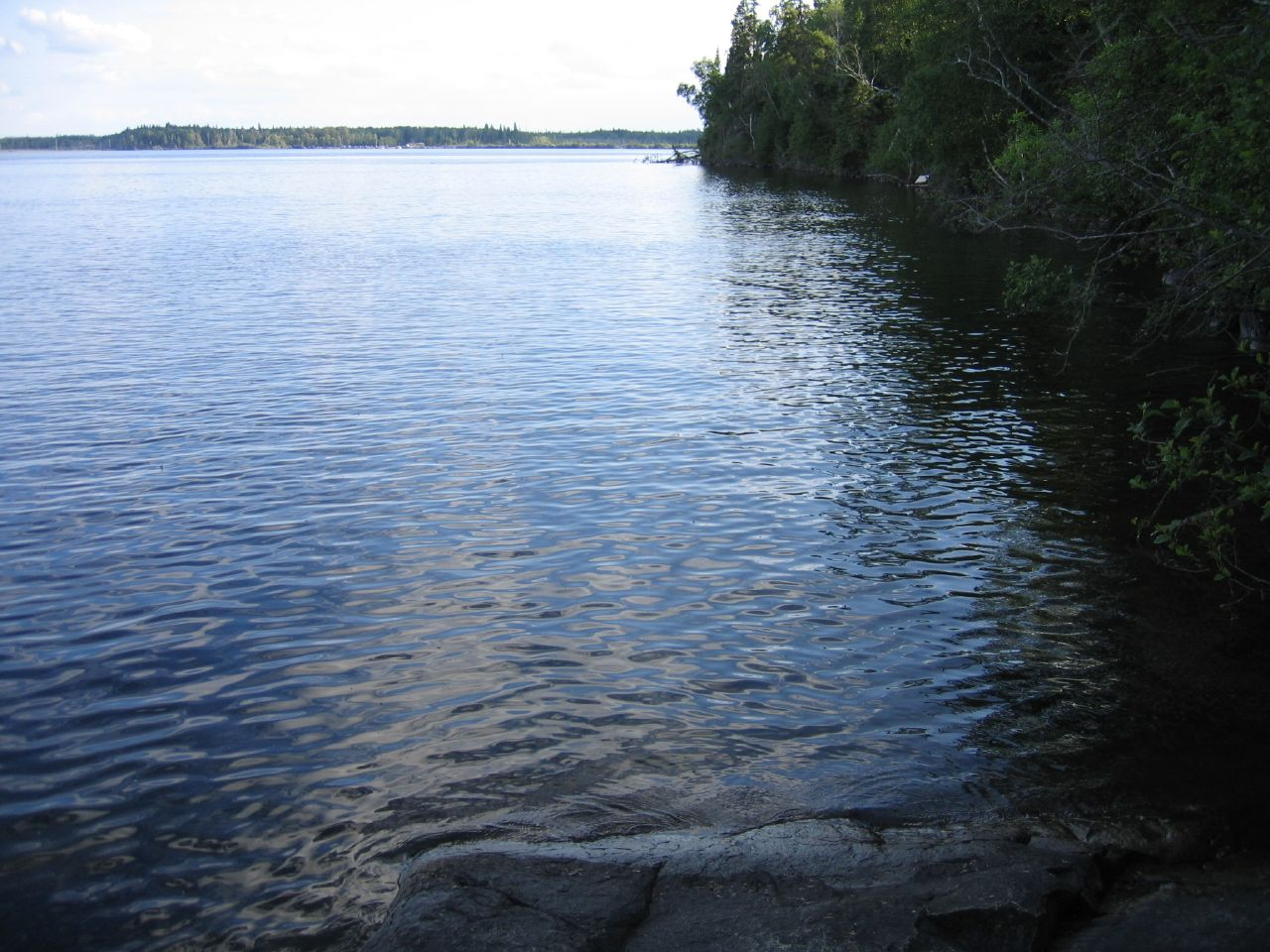 Whiteshell Provincial Park's Falcon Lake